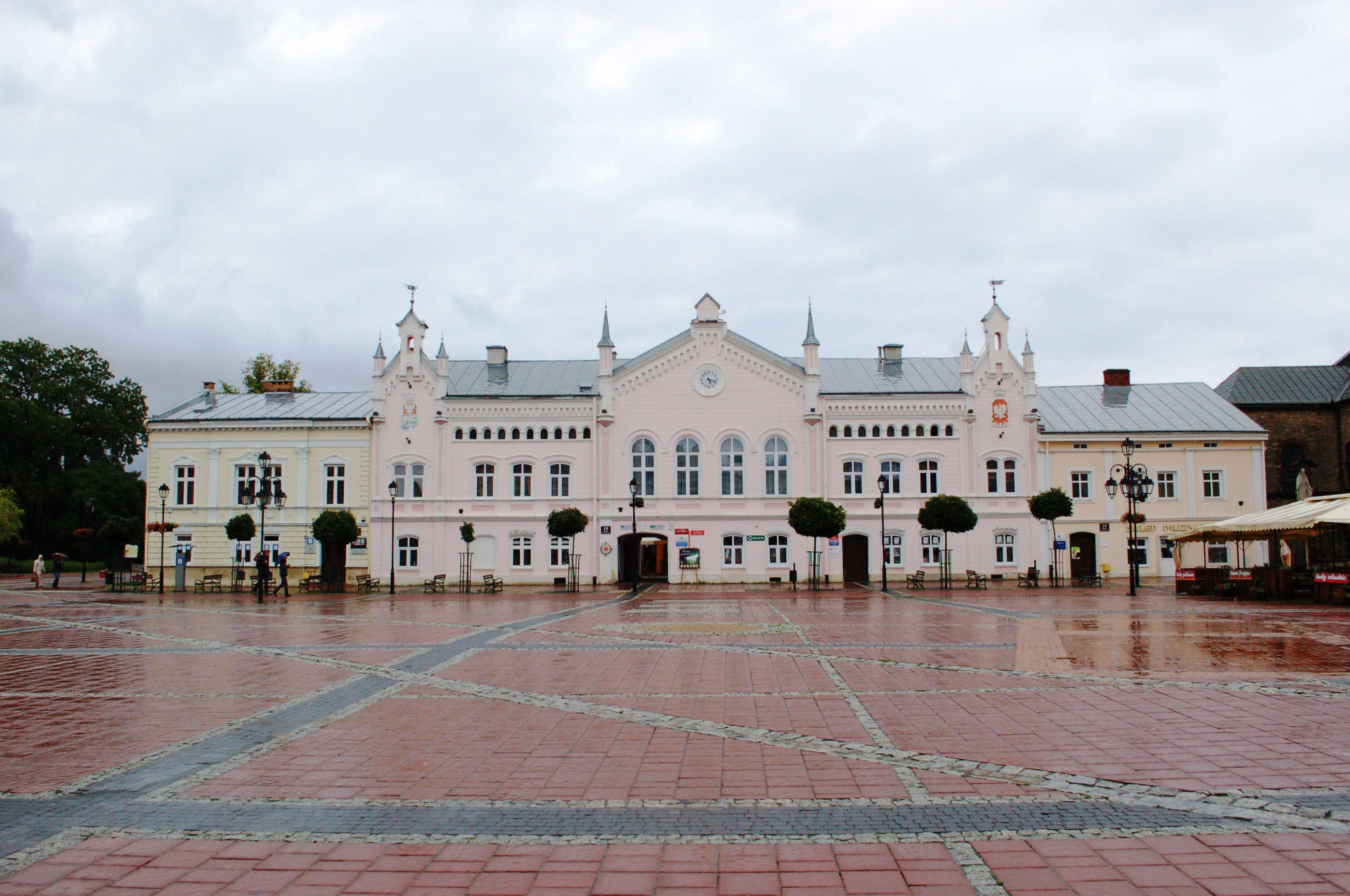 Polen, altes Rathaus in Sanok